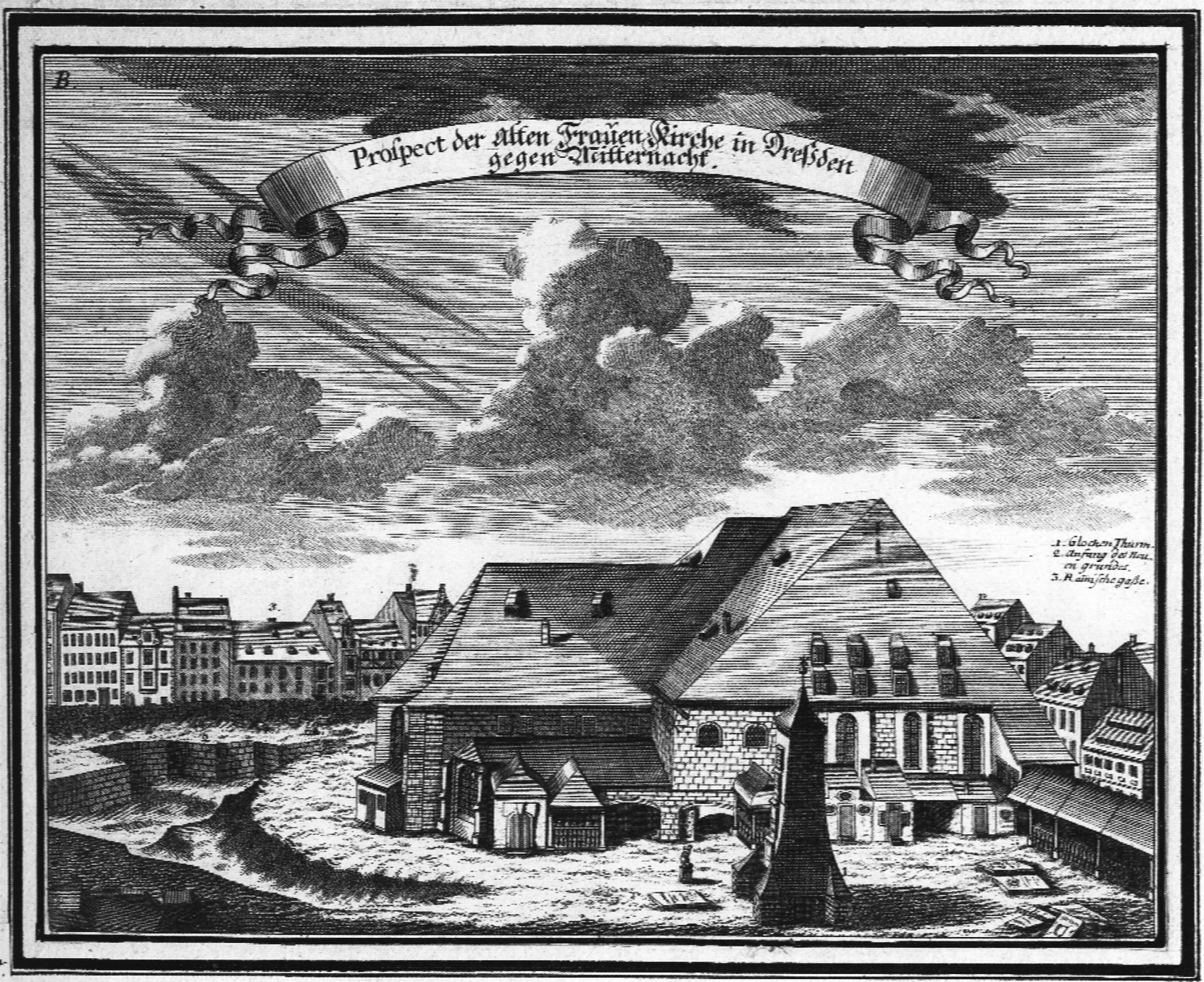 Nordansicht der alten Frauenkirche während des Abrisses; der Turmreiter wurde bereits 1722 entfernt, im Vordergrund der provisorische Glockenturm; links die Baugrube der Bährschen Frauenkirche; im Vordergrund rechts Schwibbögen an der Kirchmauer